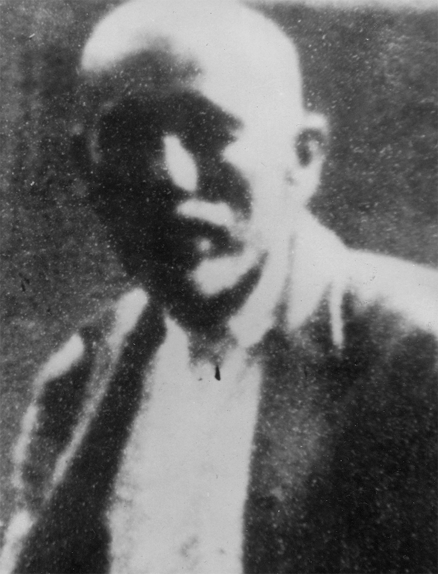 Srpski (latinica): Jakov Ostojić, narodni heroj Jugoslavije